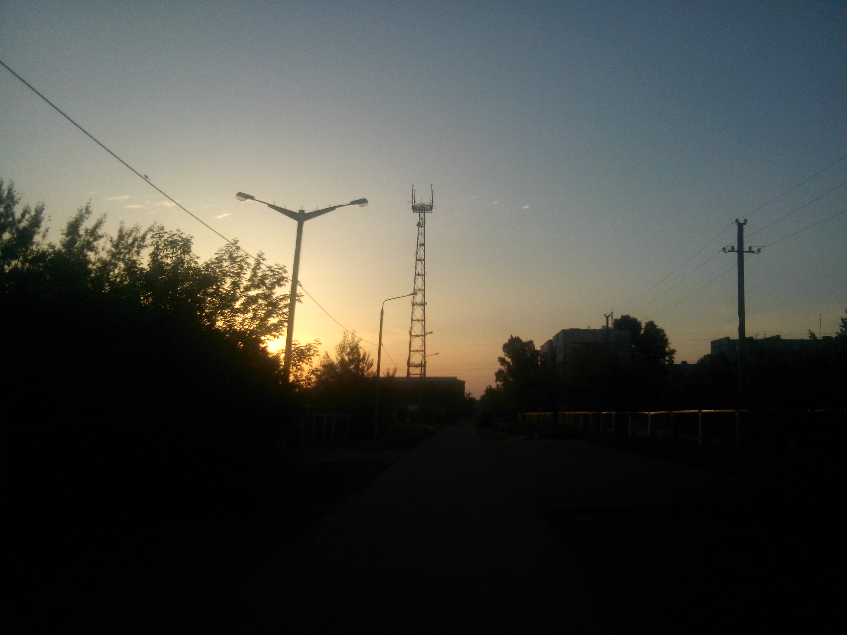 Радиомачта системы «Алтай 3М» была сооружена в Экибастузе cзади бывшего здания поликлиники № 2 в 1981 году для обеспечения радиотелефонной мобильной связи. В 2003 году оборудование кроме радиомачты было демонтировано. На сегодняшний день радиомачта используется для размещения антенн телевидения ЭГТ и Арта, радио NS и Love Radio, сотовой связи Kcell, Beeline, Tele-2, Алтел, антенн для передачи данных и для транкинговой связи.